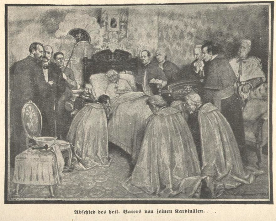 Joseph Altheimer (1860-1913), Zeichnung "Abschied Papst Leo XIII. von seinen Kardinälen"